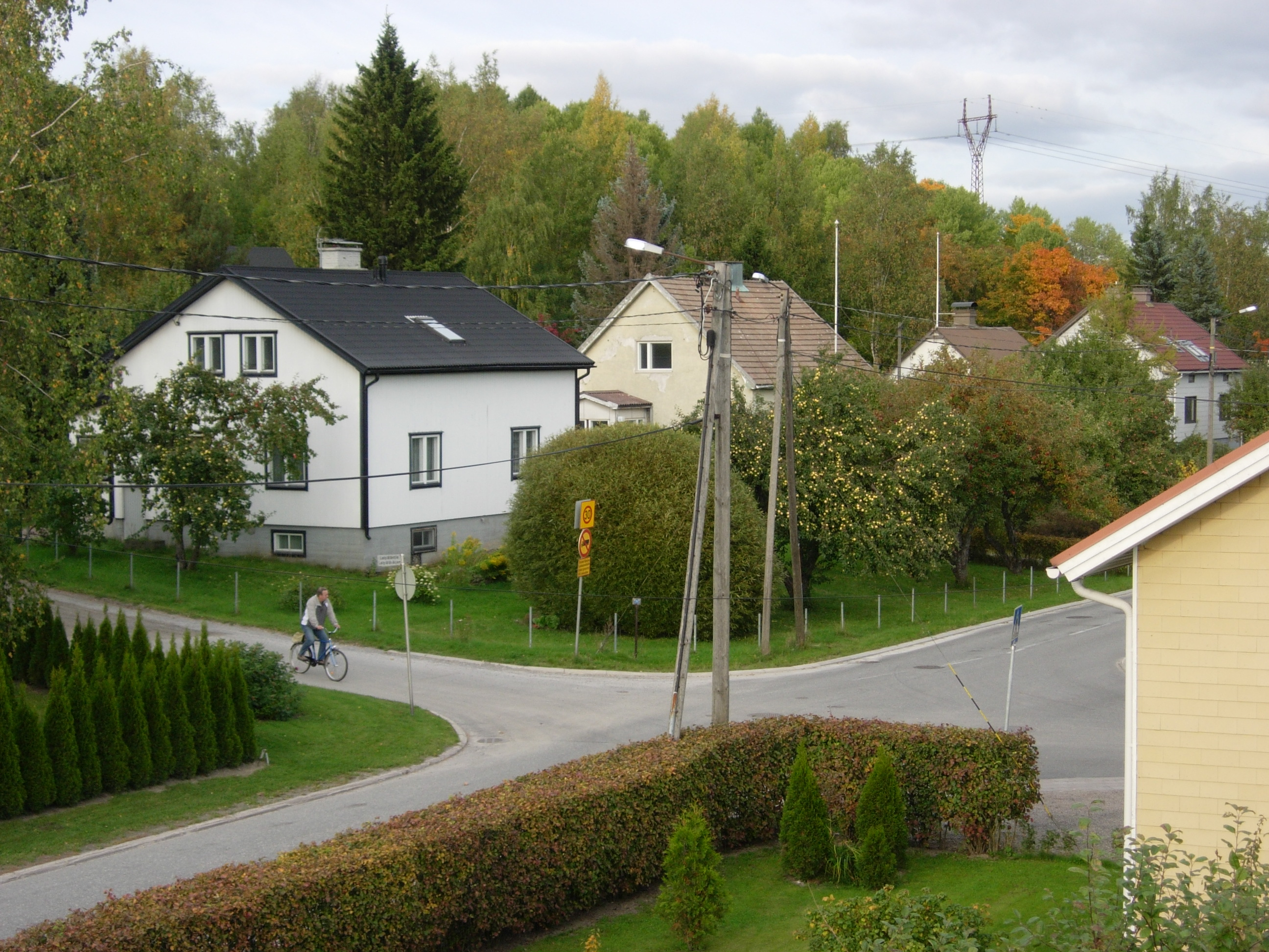 Leipäläntien ja Kastuntien risteys. Kastu, Turku.